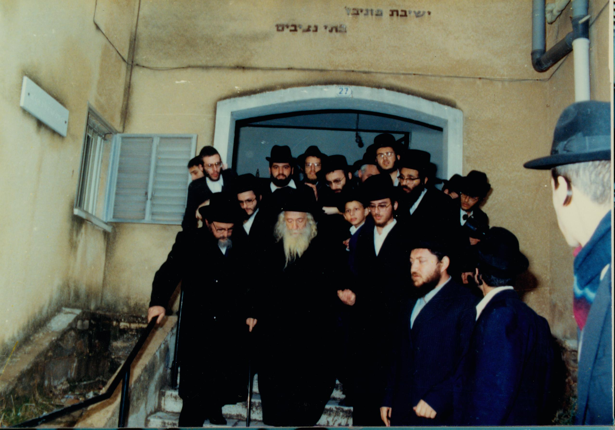 האדמו"ר השפע חיים מצאנז ביציאה מביקור אצל ראש ישיבת פוניבז', הרב אלעזר מנחם שך, בבני ברק